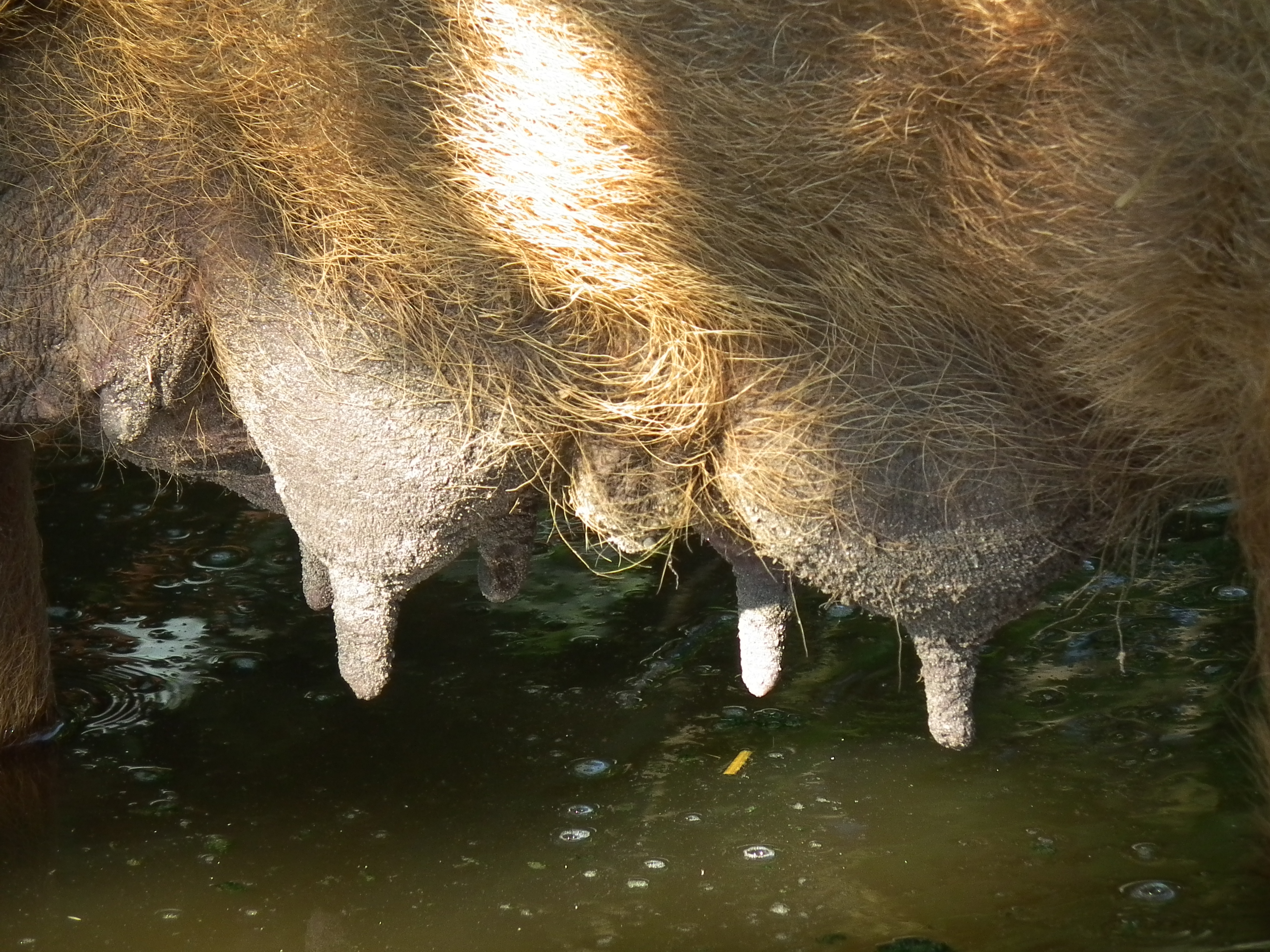 Magalitza-Schwein (Wollschwein), fotografiert im Herzogenriedpark in Mannheim (Baden-Württemberg, Deutschland)